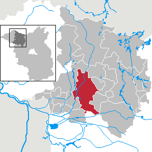 Wusterhausen/Dosse in Brandenburg (Country) - District Ostprignitz-Ruppin